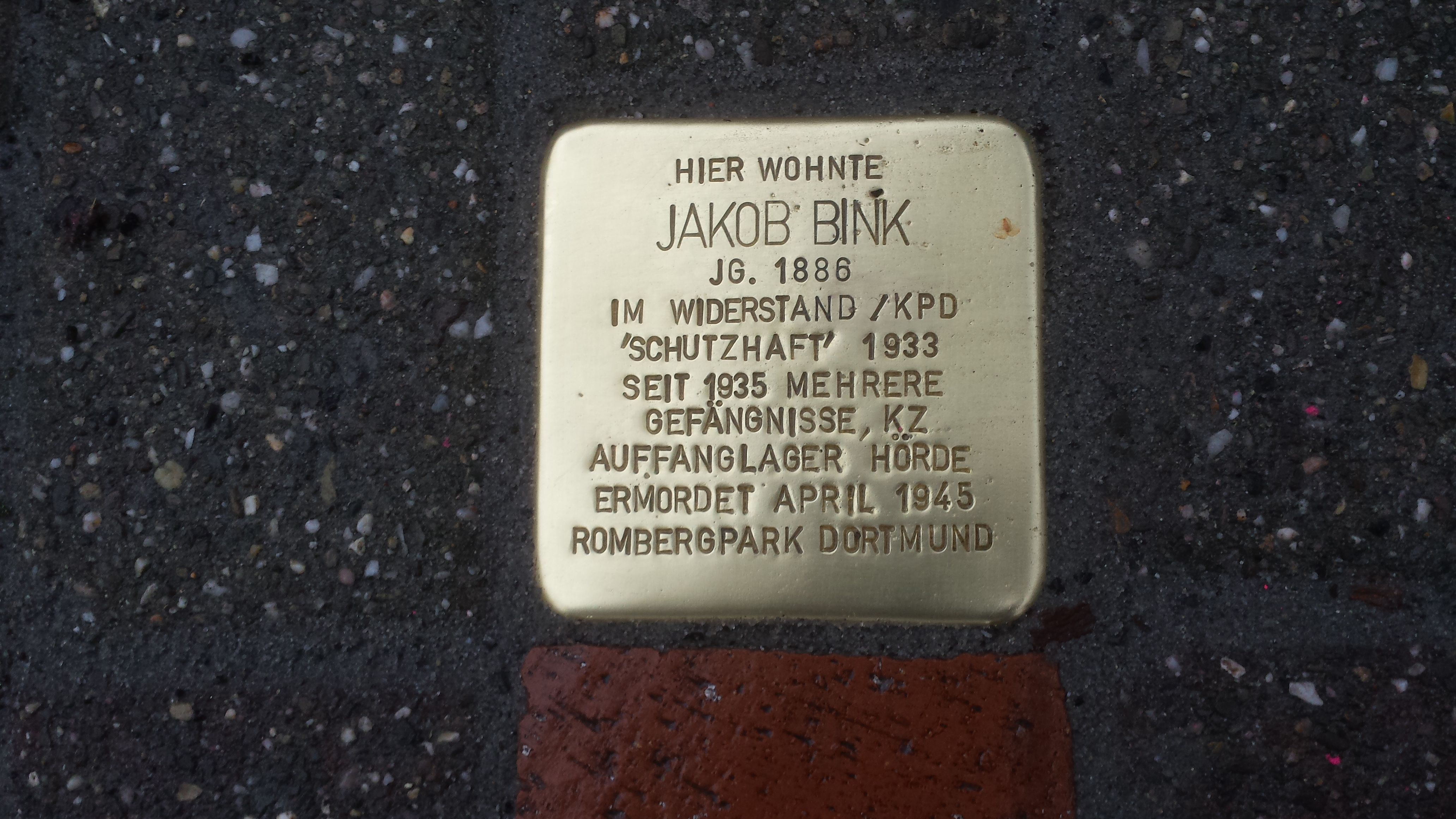 Jacob Bink, 2019